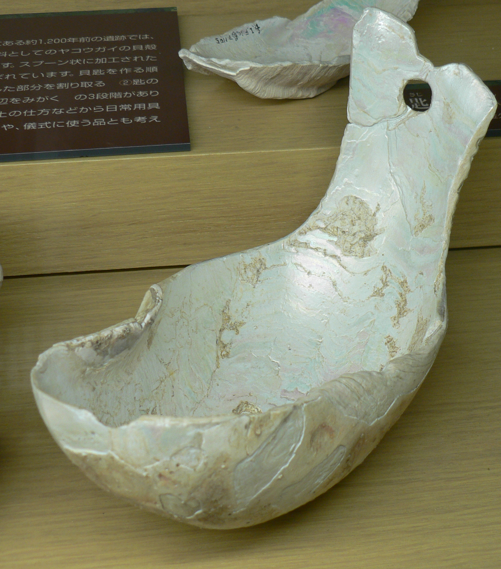 ヤコウガイから作られた貝匙。弥生時代～古代にかけてのもの。奄美大島の小湊フワガネク遺跡出土。鹿児島県上野原縄文の森展示館にて2012年4月撮影